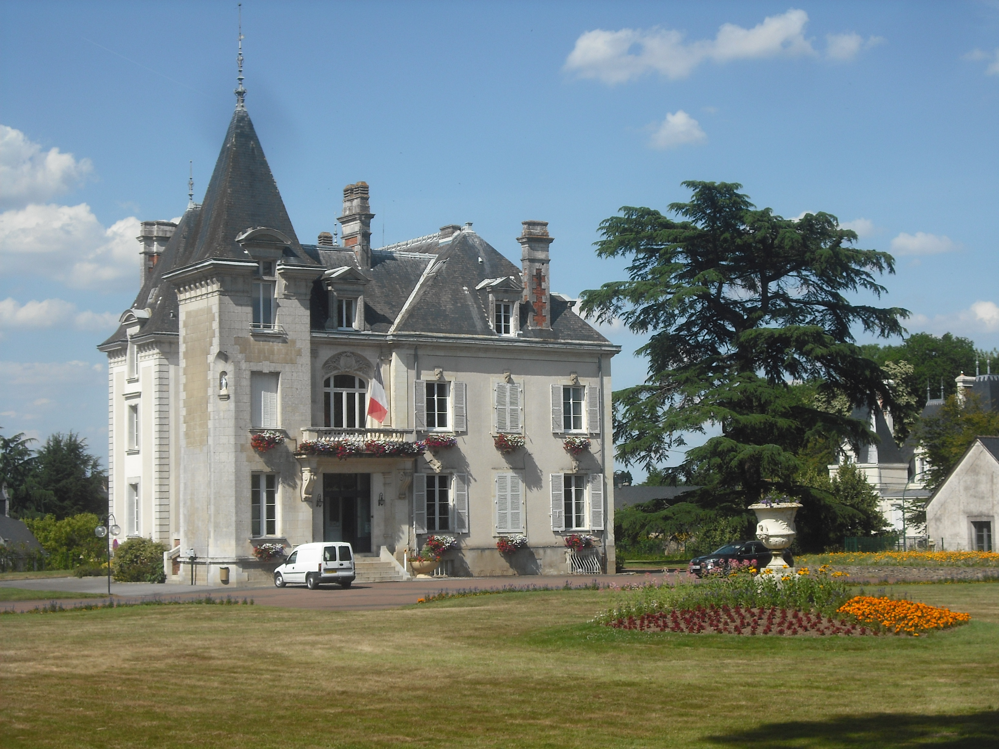 Hôtel de ville de Candé, Maine-et-Loire, France.